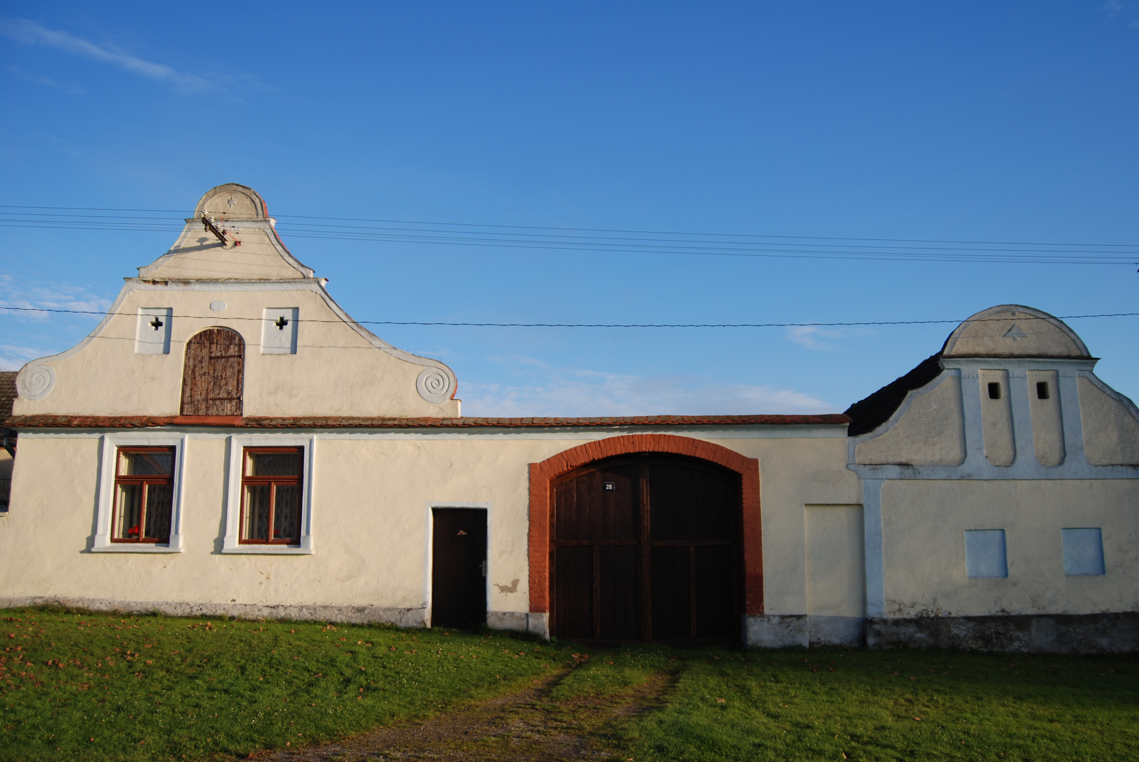 Venkovská usedlost čp. 26 v obci. Selibov je část města Protivín v okrese Písek. Česká republika.